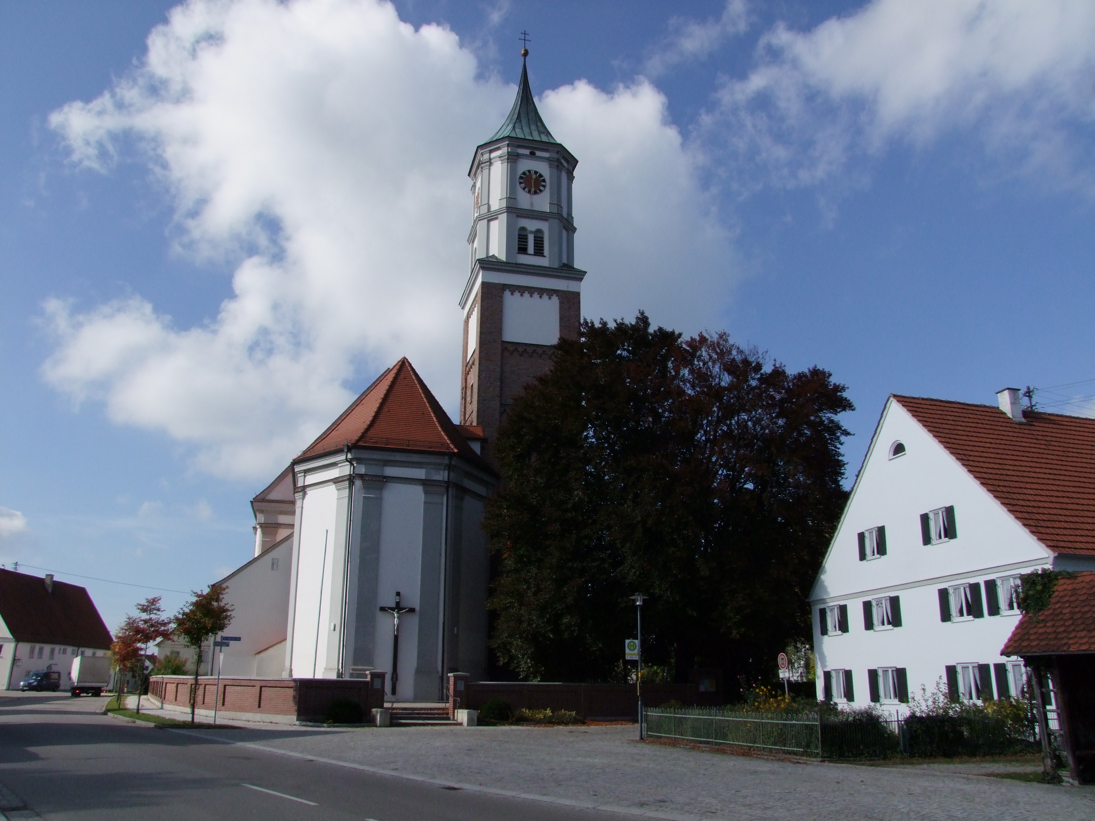 St. Martin und Nikolaus im oberschwäbischen Ettringen in Bayerisch/Schwaben